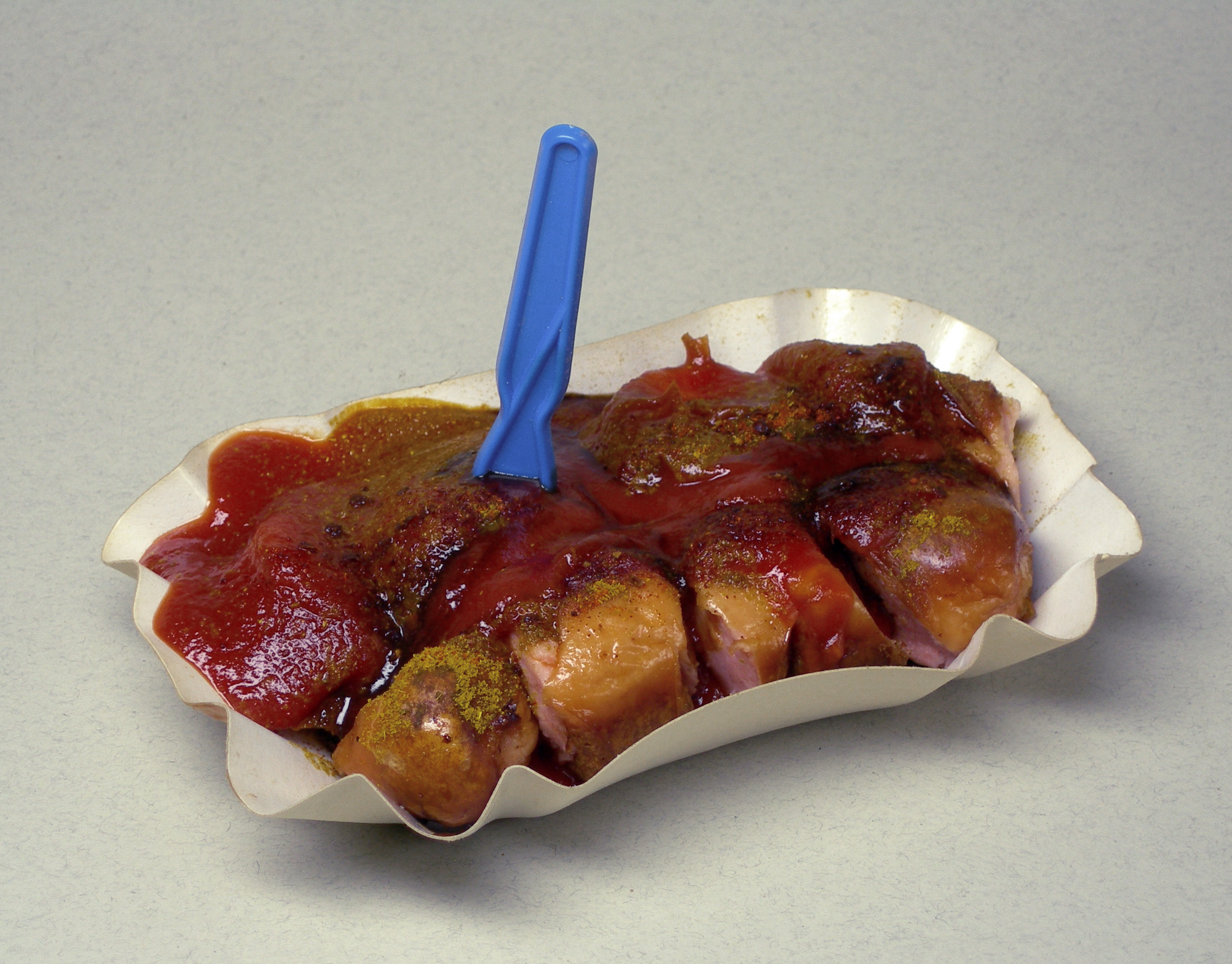 Currywurst, Berlin Stil